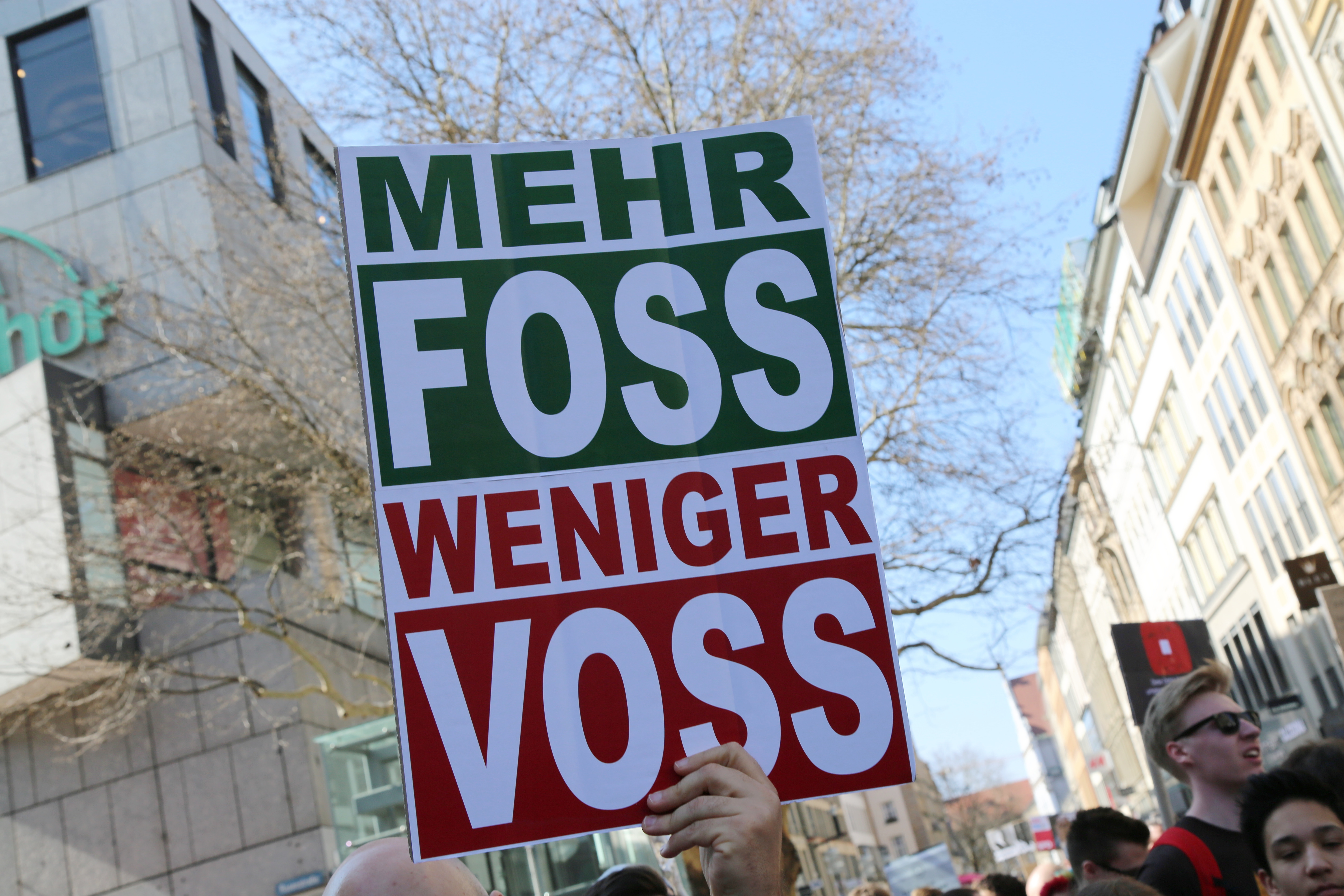 Save the internet Demonstration in München am 2019-03-23